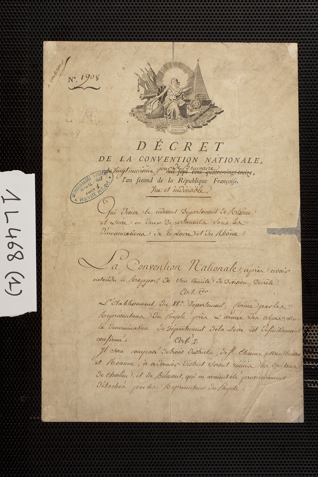 ADRML, 1 L 468